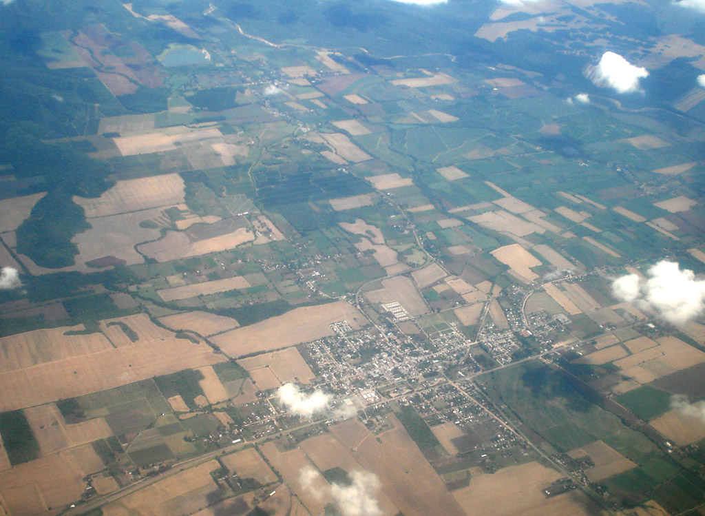 Vista aérea de la Ciudad de La Chocha, Tucumán.